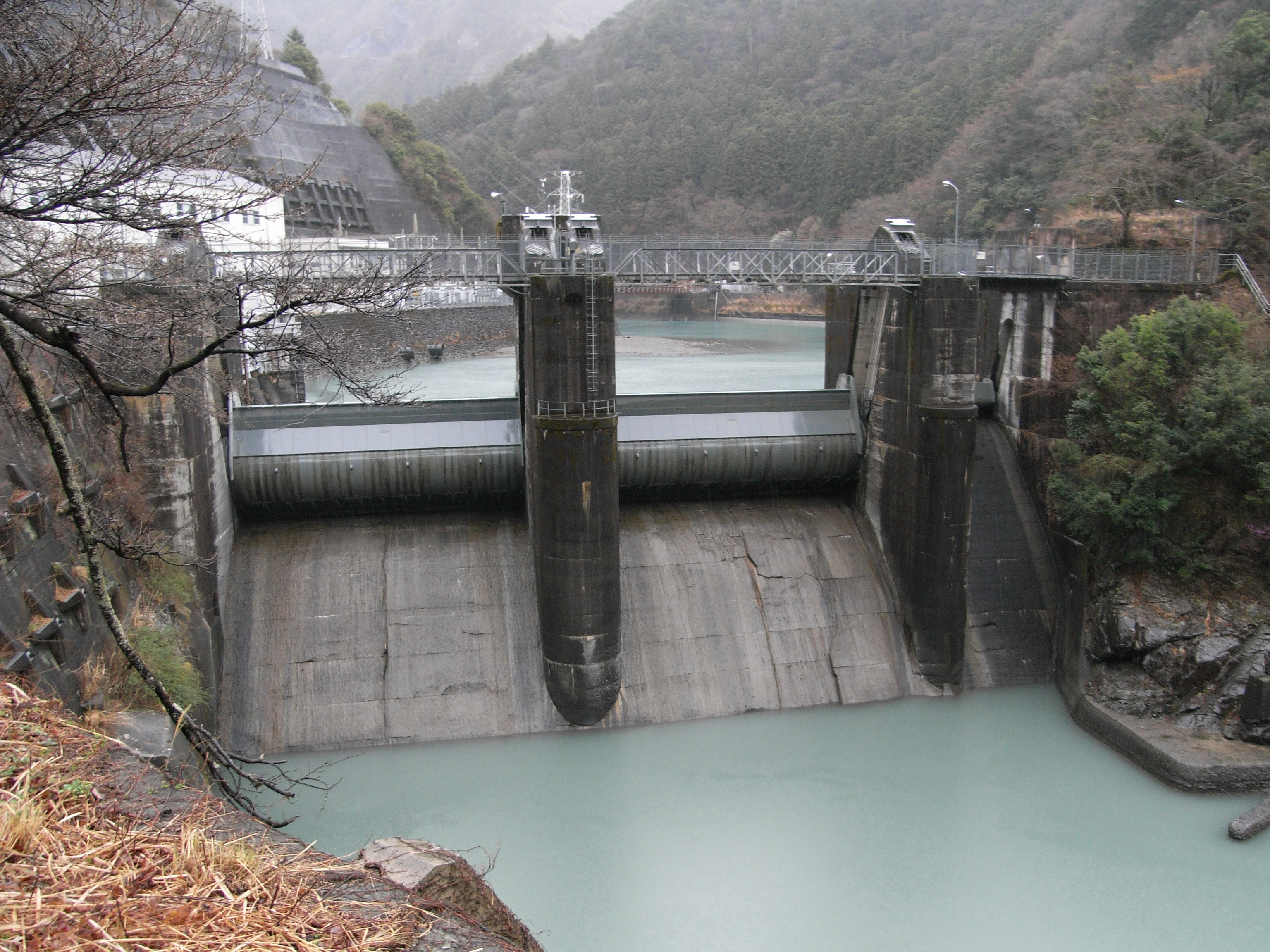 Dam